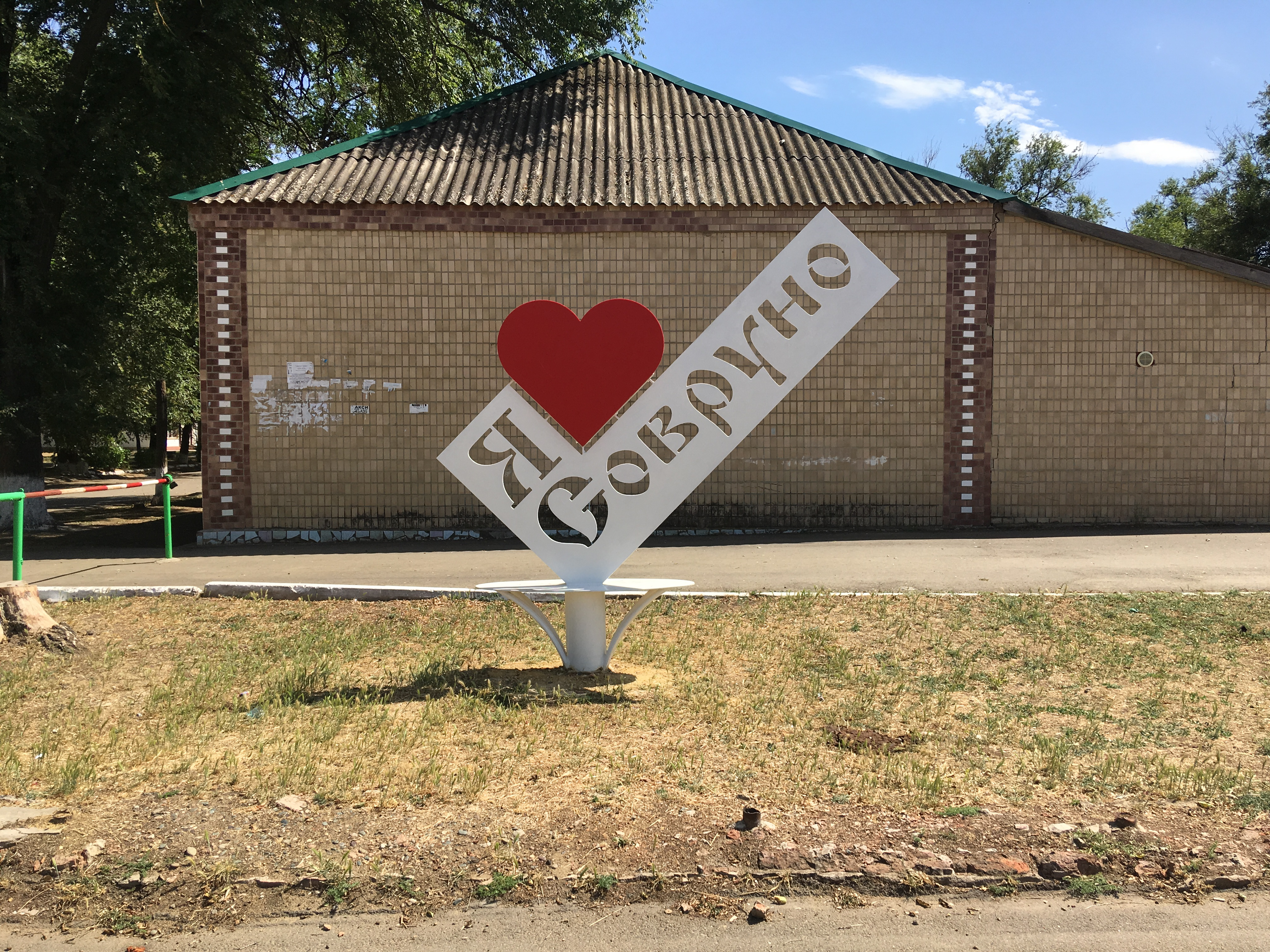 Памятник в посёлке Советское Руно